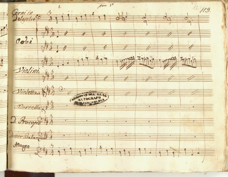 Domenico Cimarosa: Le Magie di Merlina, e Zoroastro, pagina della partitura autografa.